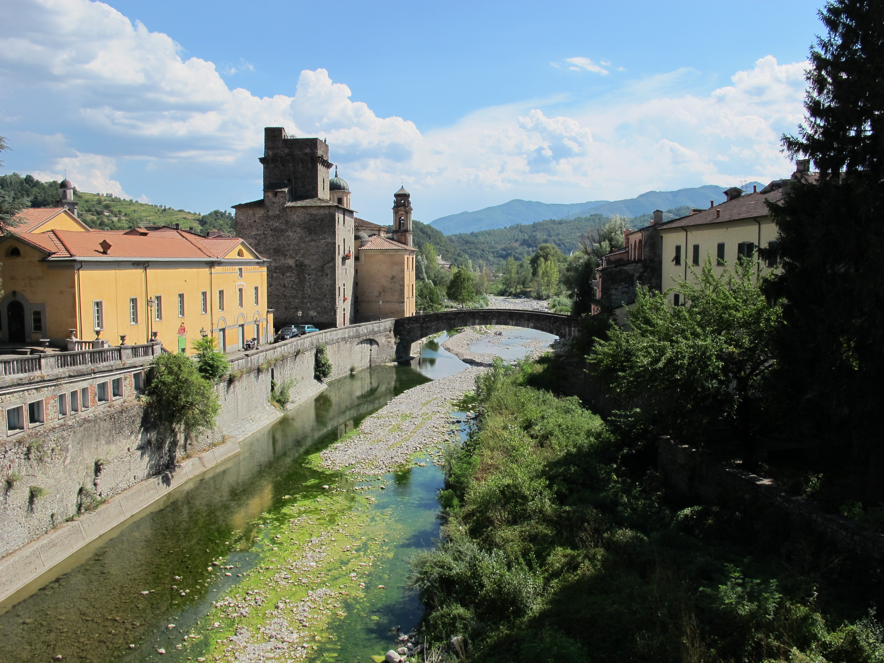 Pontremoli, lungomagra